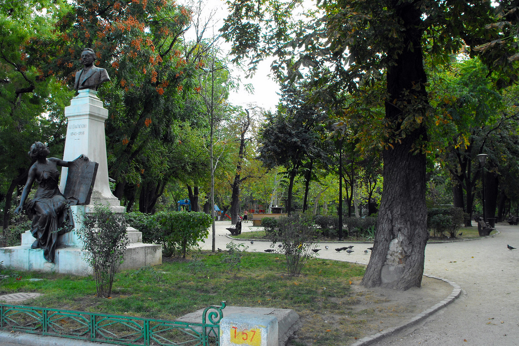 Gradina Icoanei